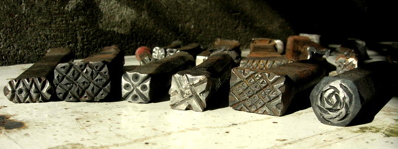 Poinçons utilisés par le peintre Mohamed Aksouh pour ses gravures